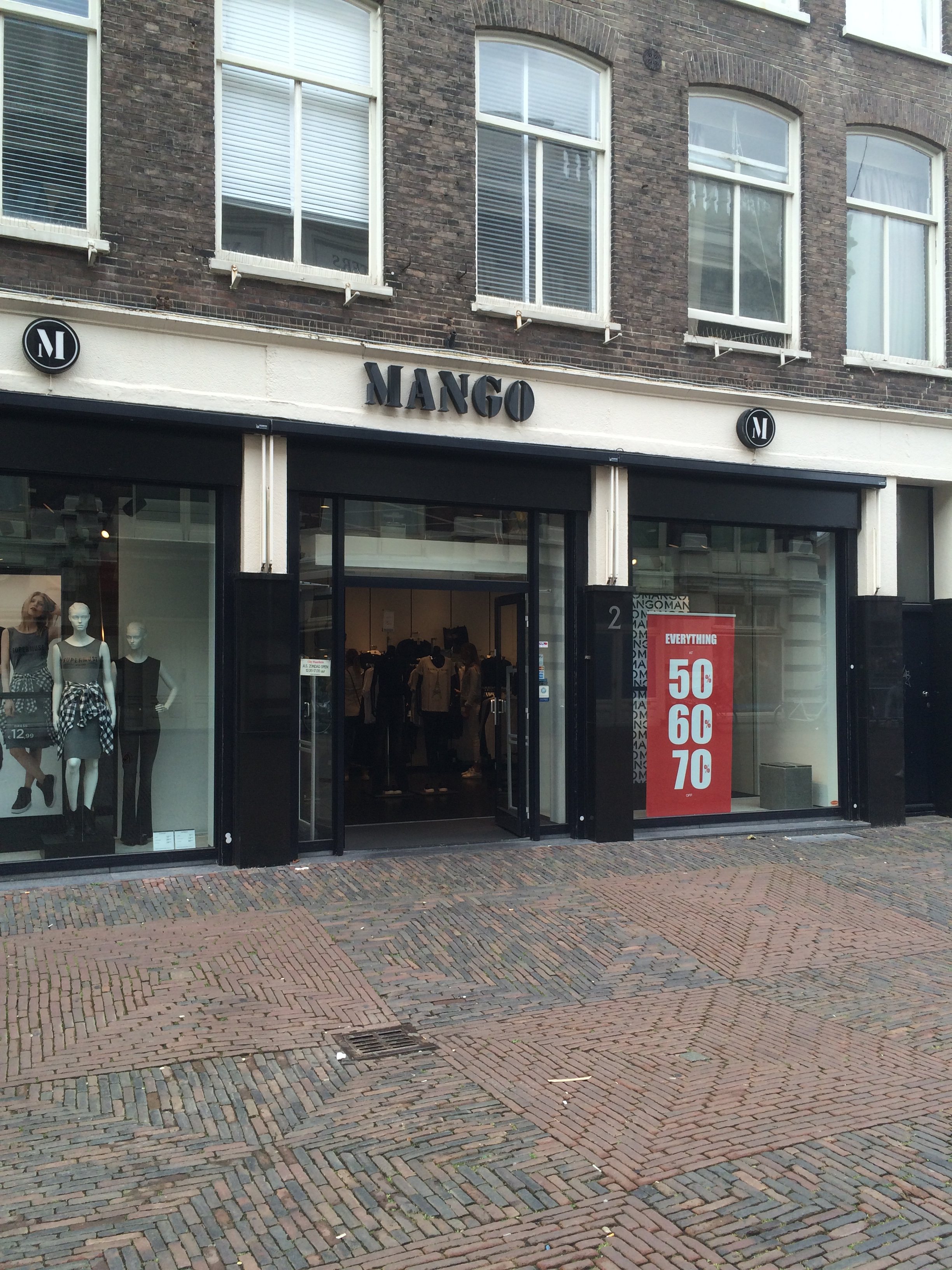 Mango Shop